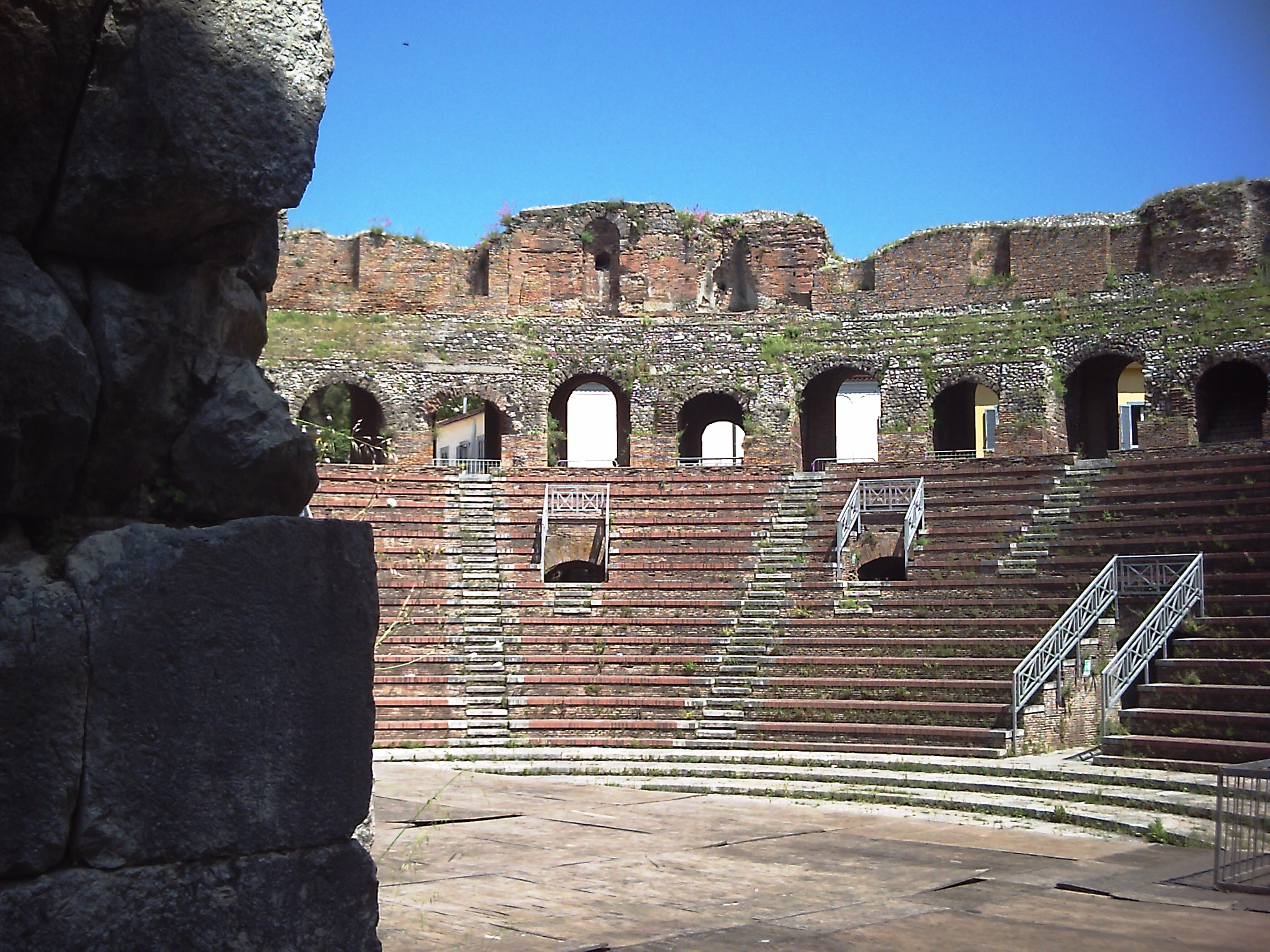 Particolare del Teatro romano di Benevento